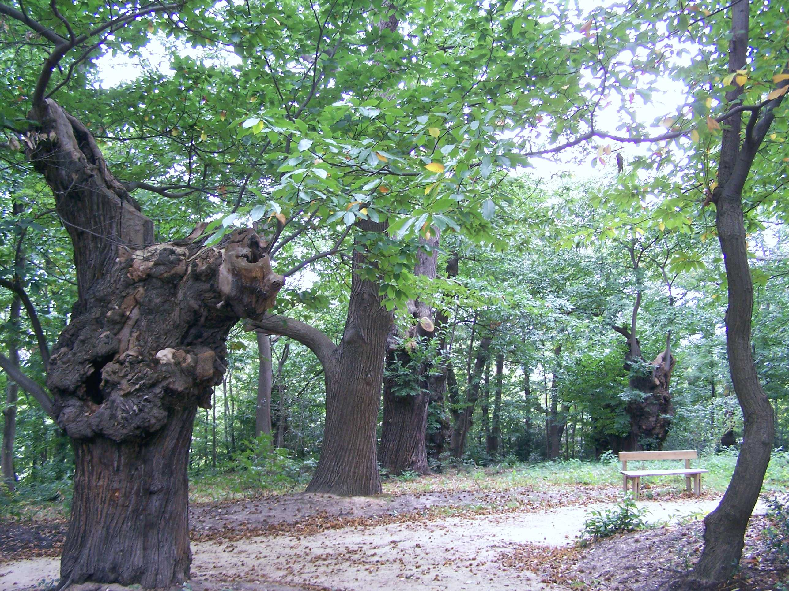 Groupe de châtaigniers du site de Tournebride à la Celle-Saint-Cloud (Yvelines, France)